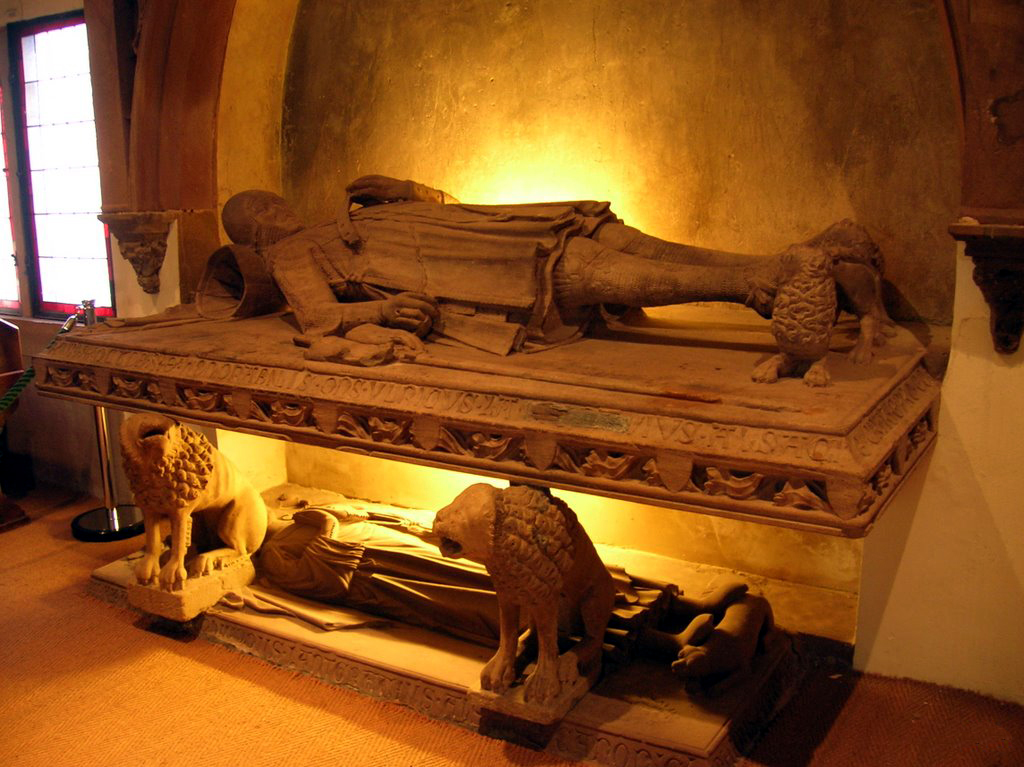 Landgrafen von Werd